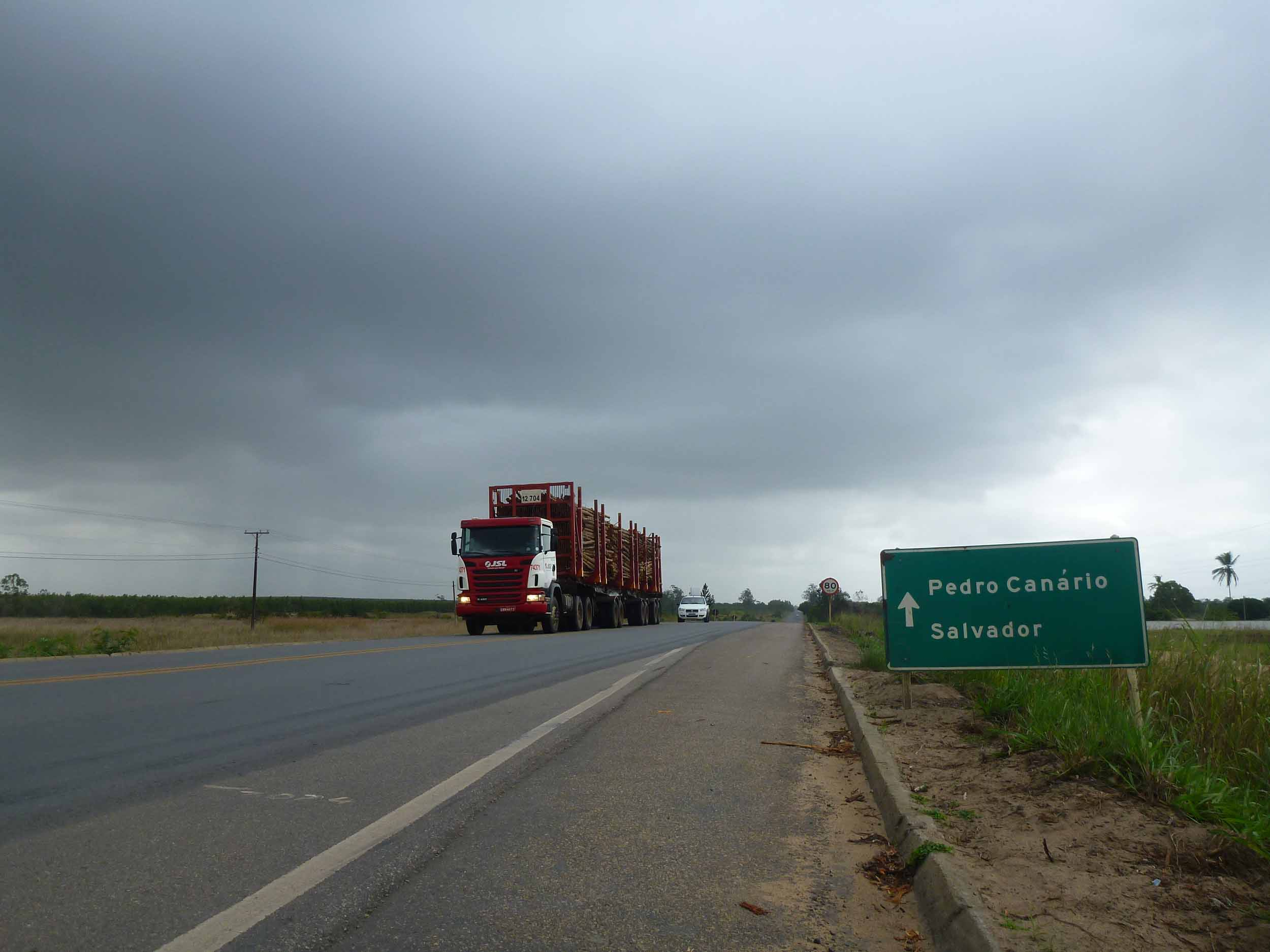 La BR-101 a su paso por el estado brasileño de Espírito Santo.